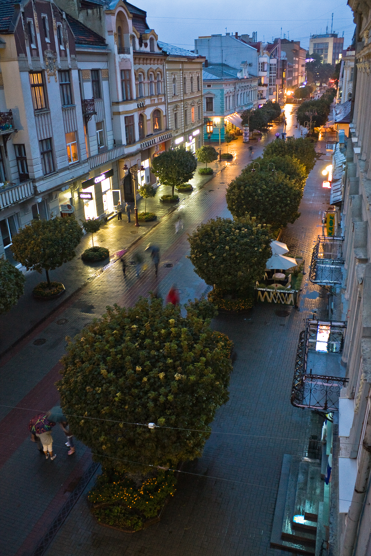 Стометрівка зверху (09/2010)